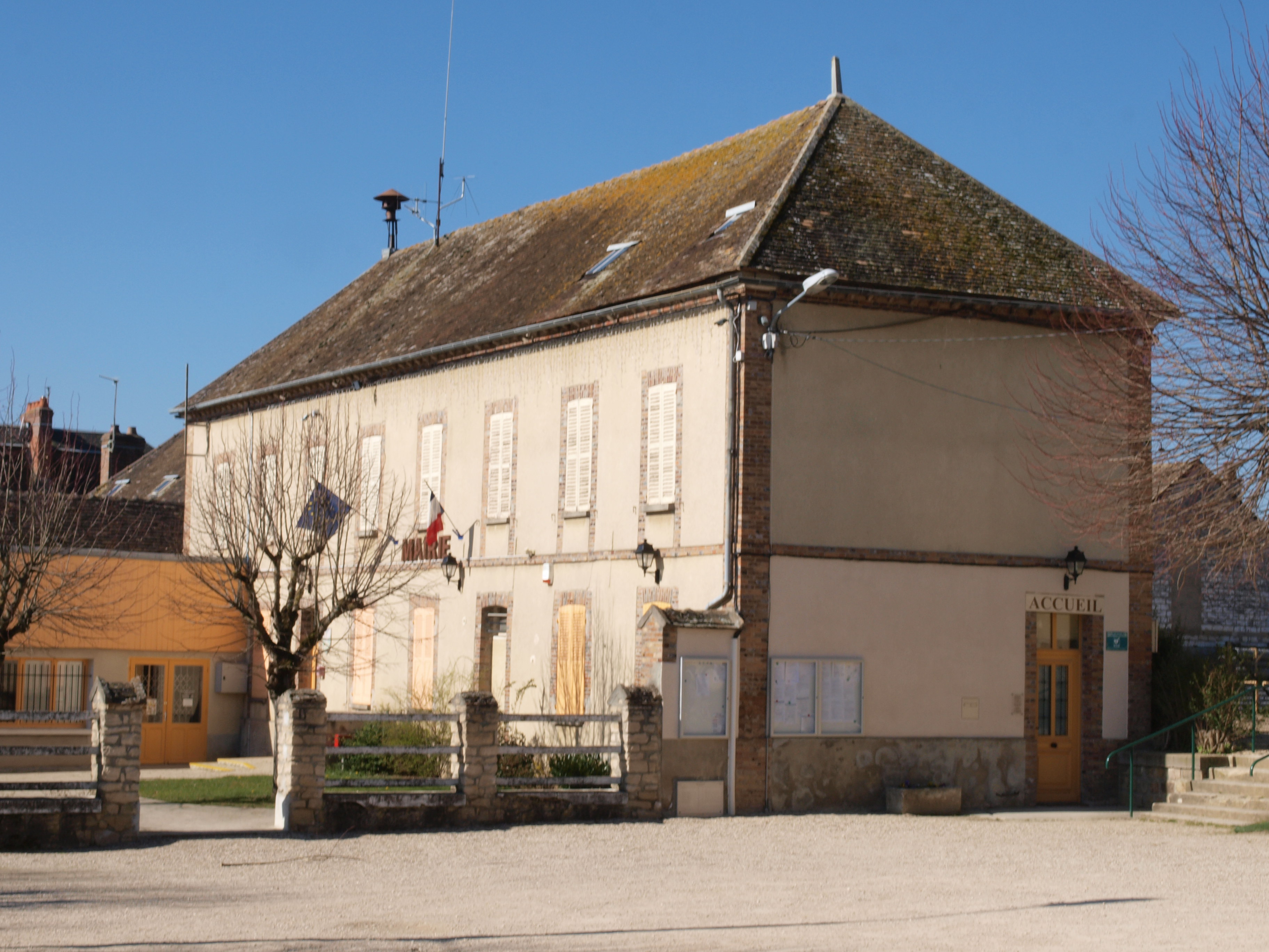 Michery (Yonne, France) ; mairie